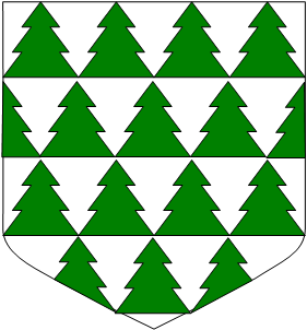 Vairé en cime de sapin d'argent et de sinople